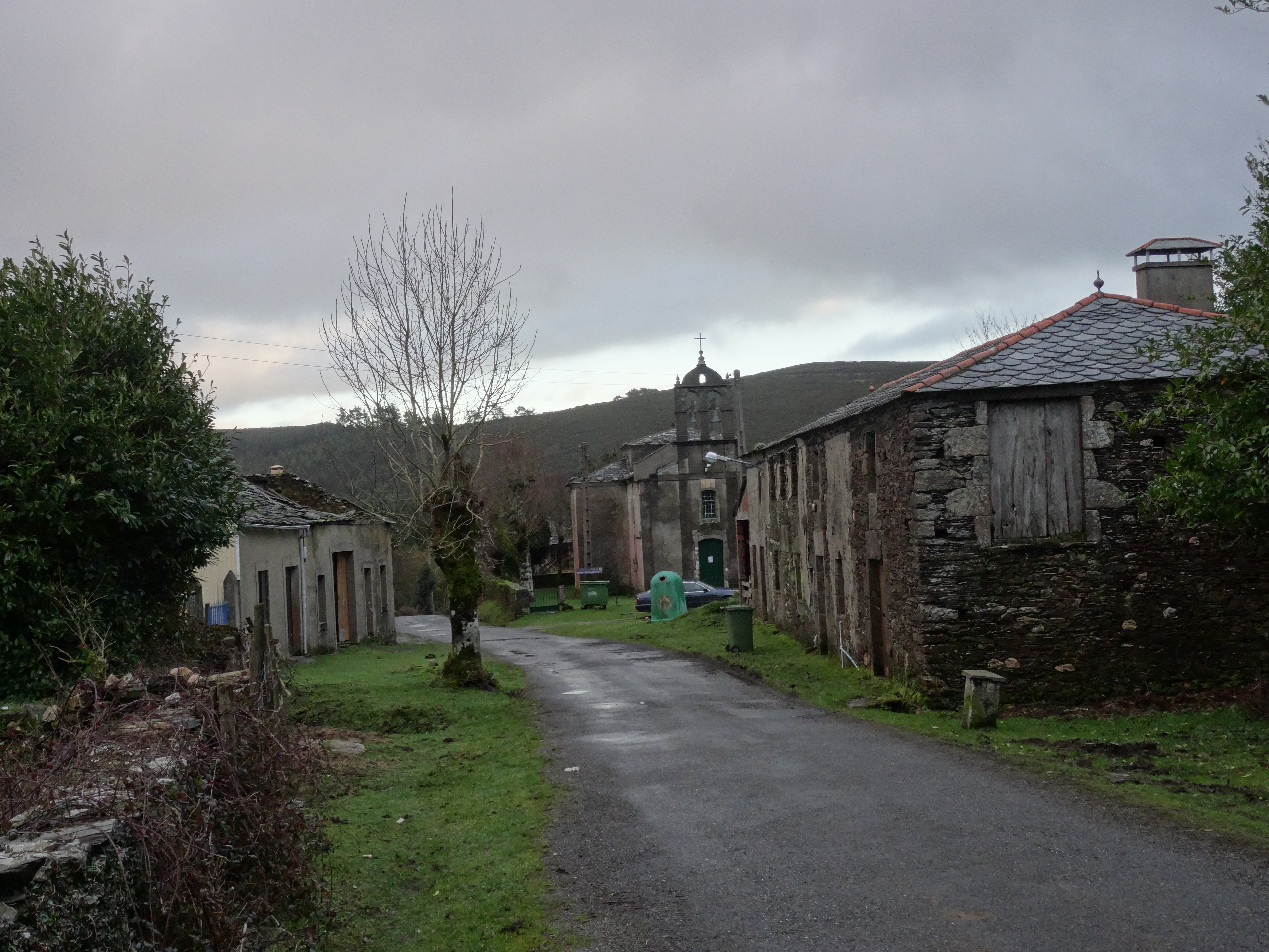 Ver título.